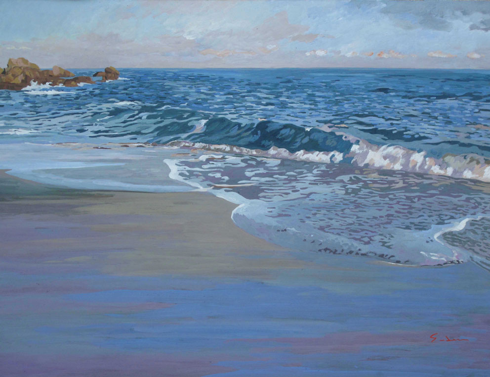 Lesconil